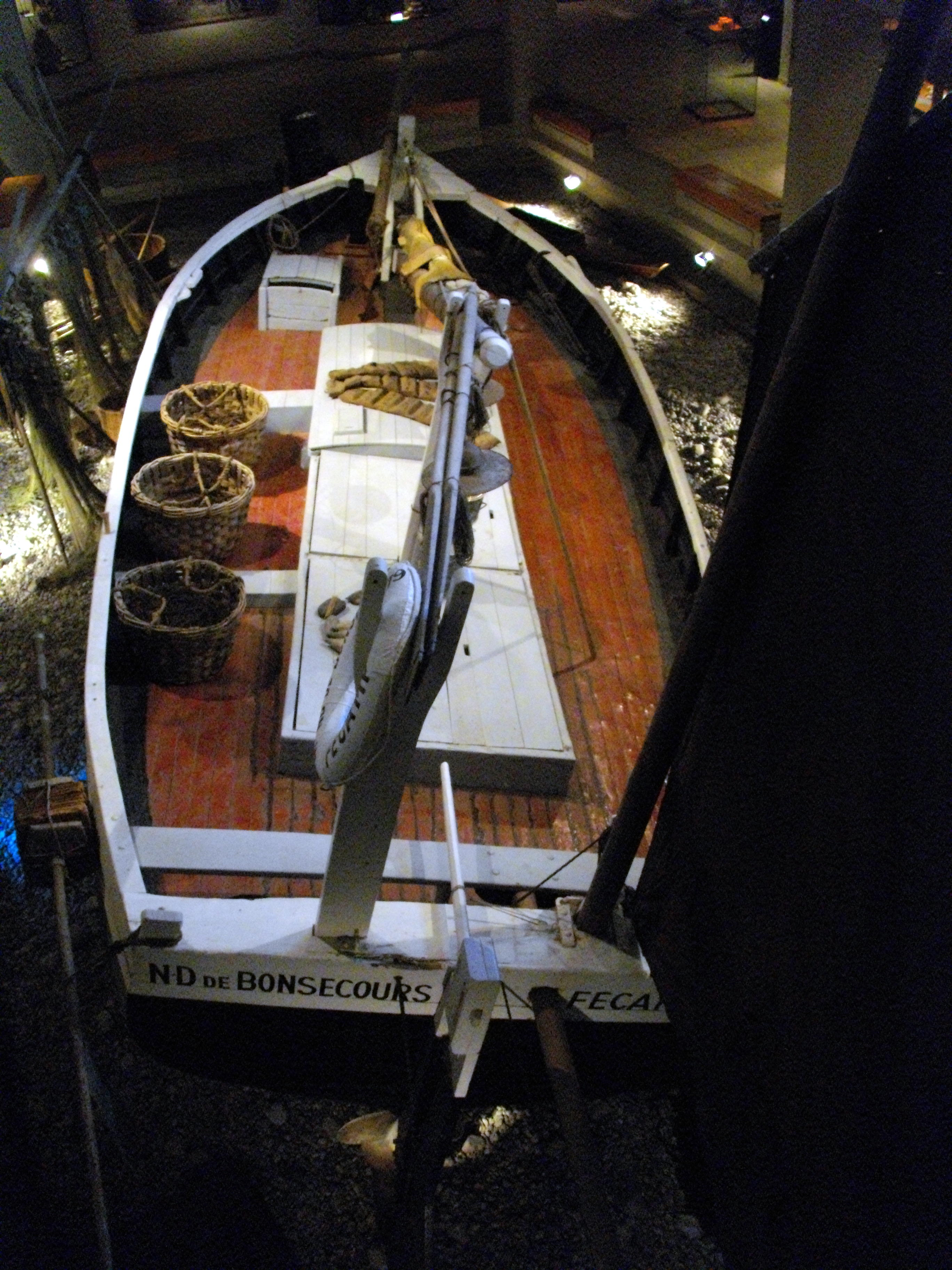 Le caïque Notre-Dame de Bonsecours